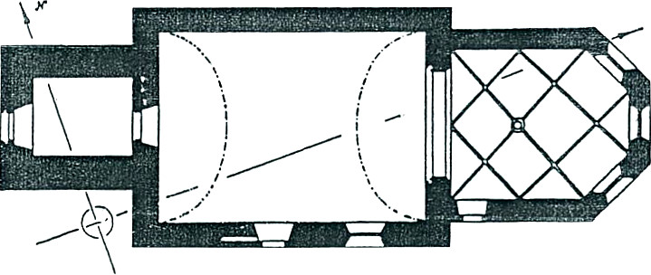 Der Grundriss der Paulskirche Hermannstein